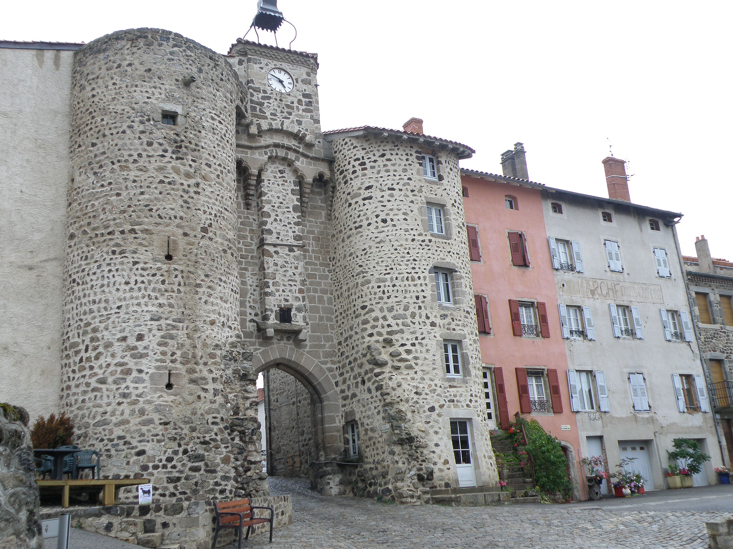 Allègre, dép. de la Haute-Loire, France. Porte de Monsieur. Remarquer les mâchicoulis tréflés, signature du château d'Allègre.